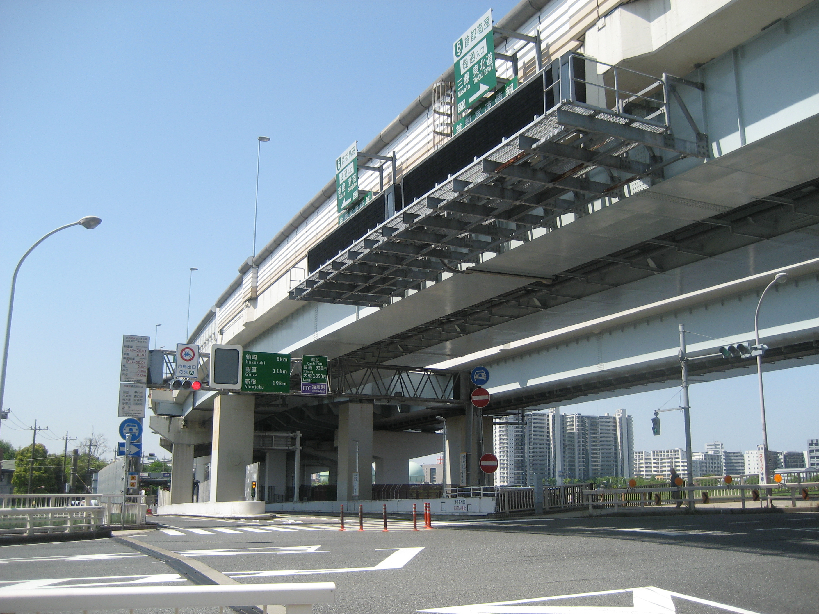 首都高速6号向島線堤通出入口（箱崎JCT方面側）